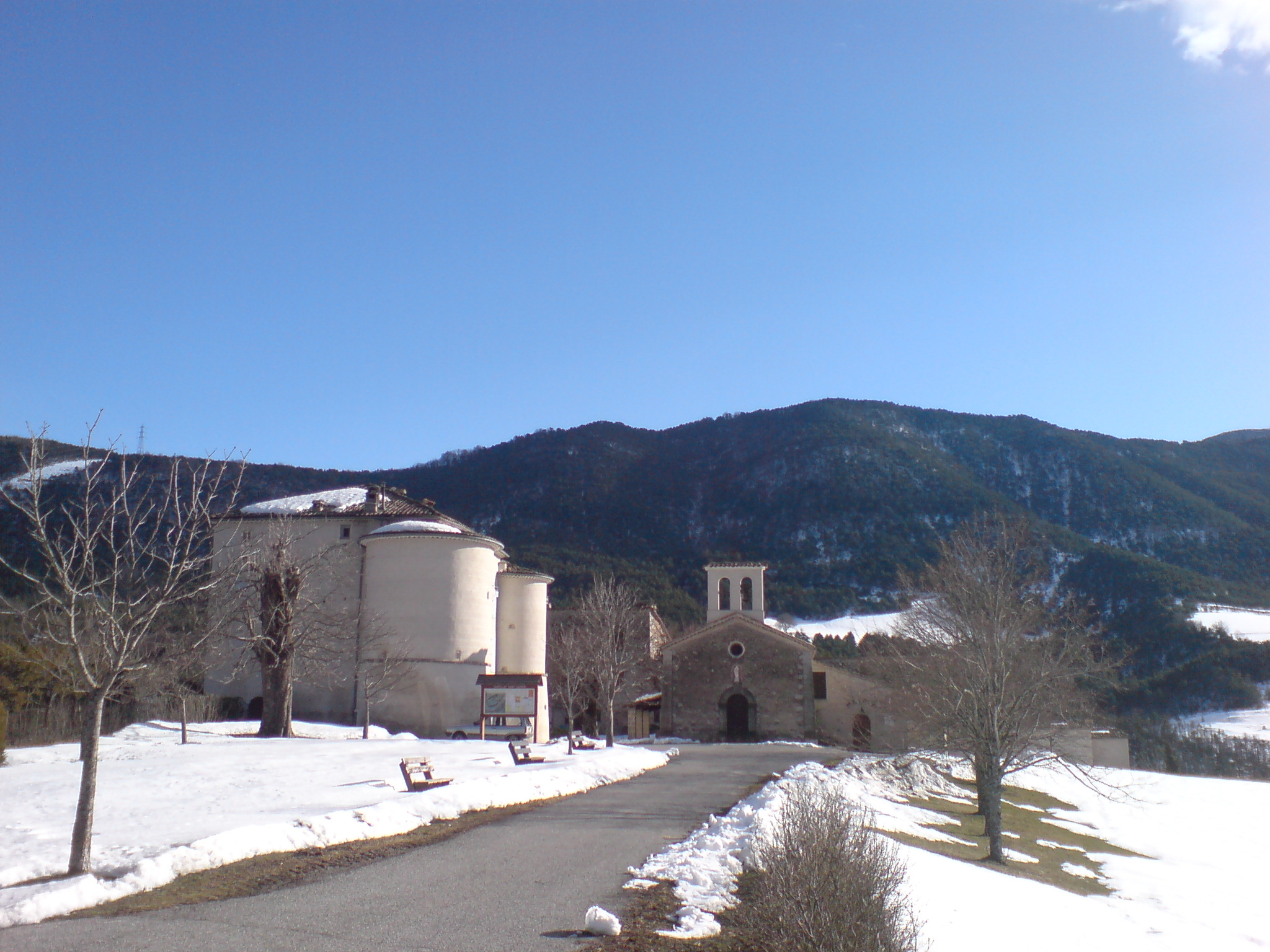 Hameau de Castellet-Saint-Cassien : château à gauche, église.